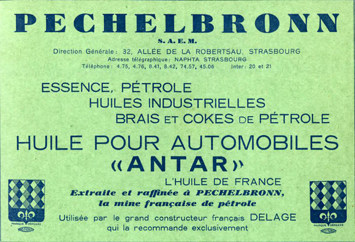 Publicité pour Pechelbronn dans La Vie en Alsace, août 1933